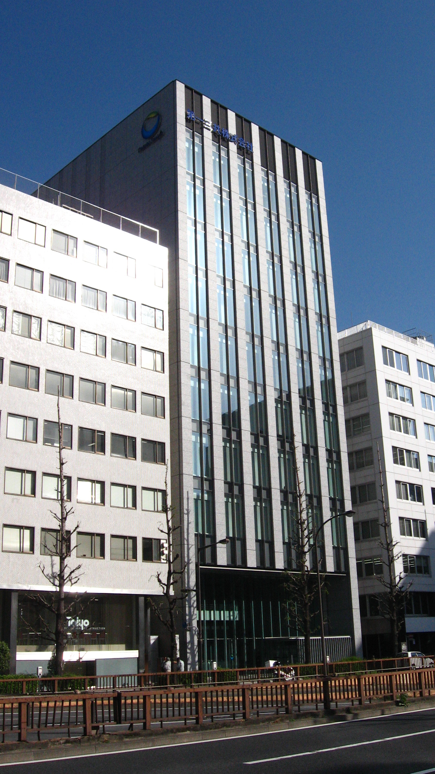 第一三共株式会社本社ビル（東京都中央区日本橋）